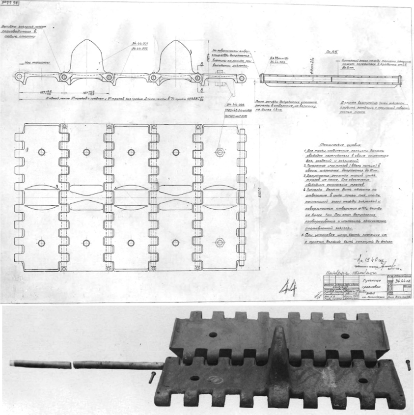 Фотография и чертеж трака танка Т-34